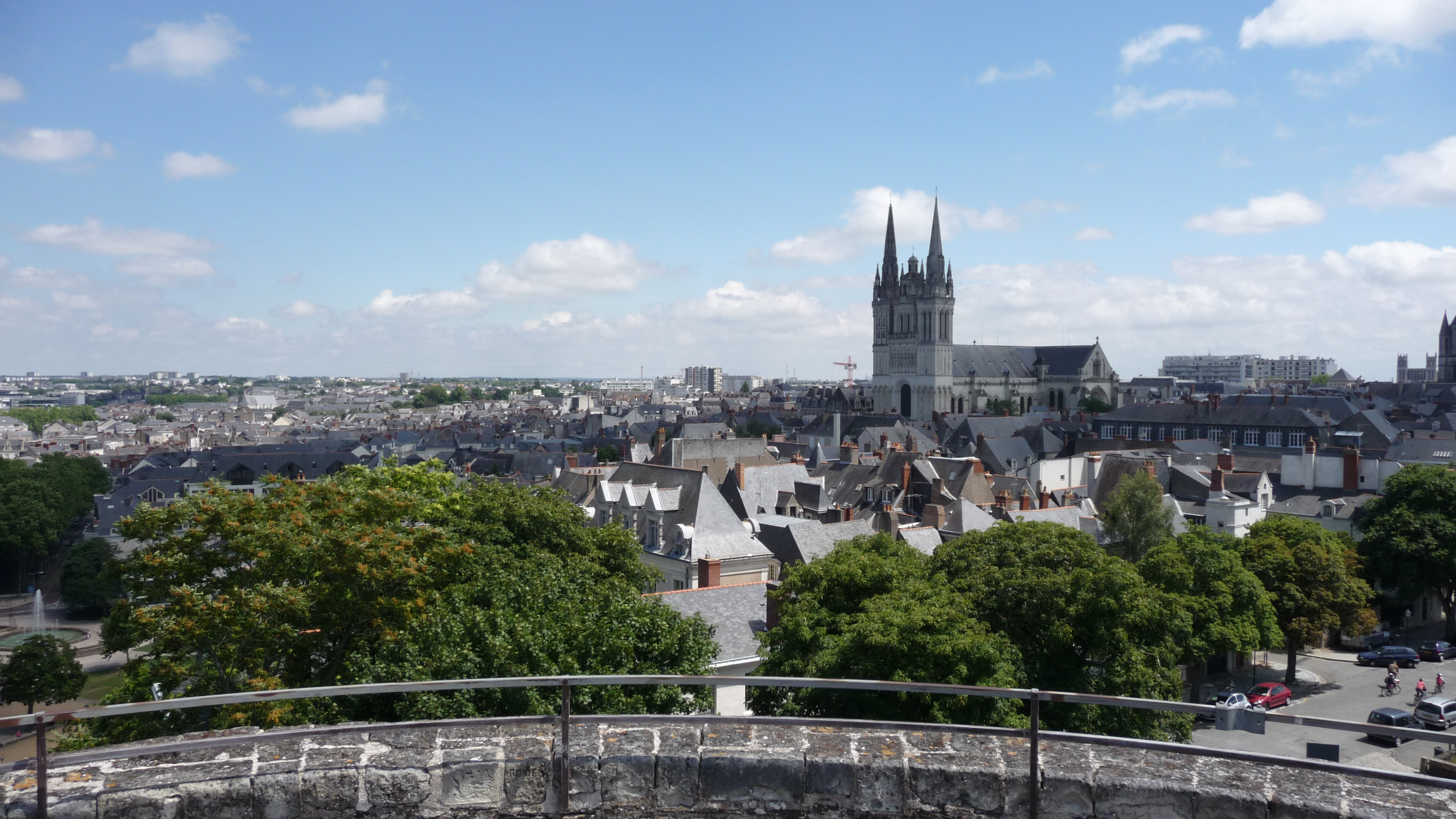 A partir de la tour du moulin du château d'Angers